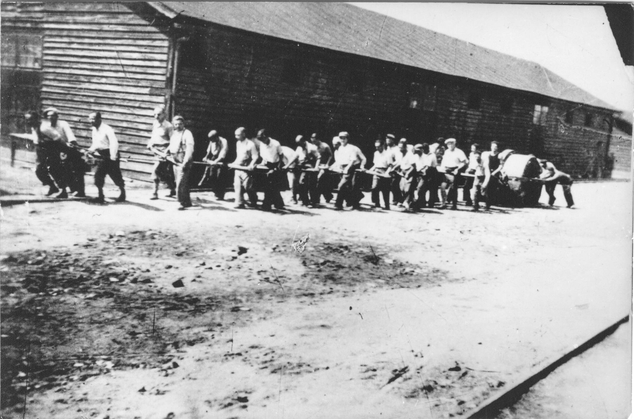 Srpskohrvatski / српскохрватски: Zlostavljanje i maltretiranje Jevreja u sabirnom logoru u Sarajevu 194l. godine.